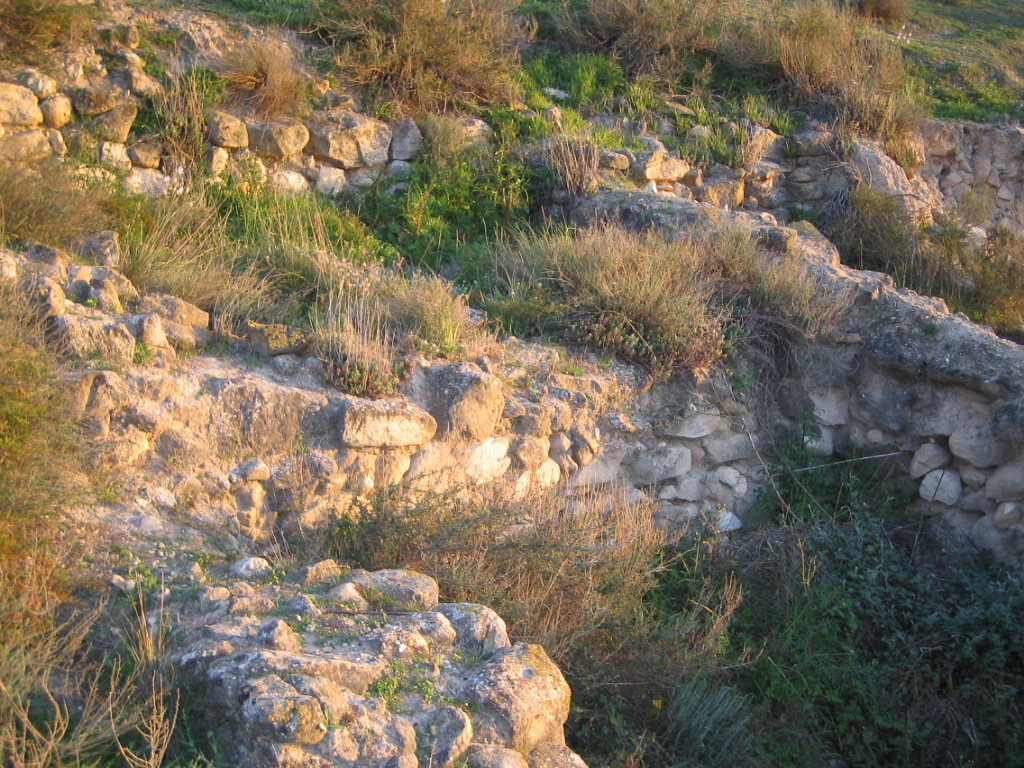 Fotografía de Los Saladares